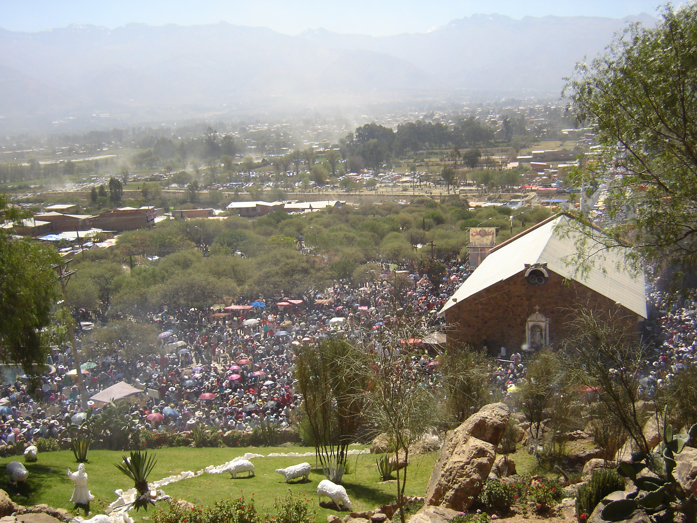 Una vista del Calvario de la Virgen María de Urqupiña lleno de peregrinos que acuden hasta este lugar cada 16 de agosto. Runa Simi: Juq qhawariy Urqupiñamanta Llump'aq Mariyaq Kalwariunta junt'a iñiqkuna riqkunawan chay riqkama sapa 16 p'unchay chaqrayapuy killapi.